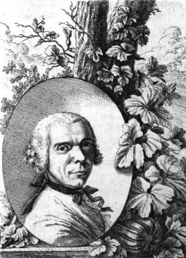 Portrait des Schweizer Malers Johann Balthasar Bullinger.